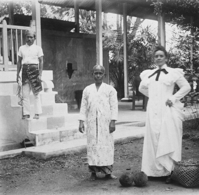 Foto. Mevrouw Ponse met bediendes en durians